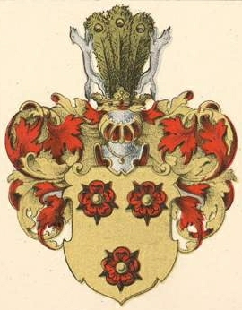 Roseni (punane) suguvõsa aadlivapp